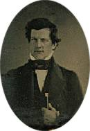 Solom Andrews, (1806-1872) inventor del primer dirigible (Aeron I) Daguerrotipo de 1842.